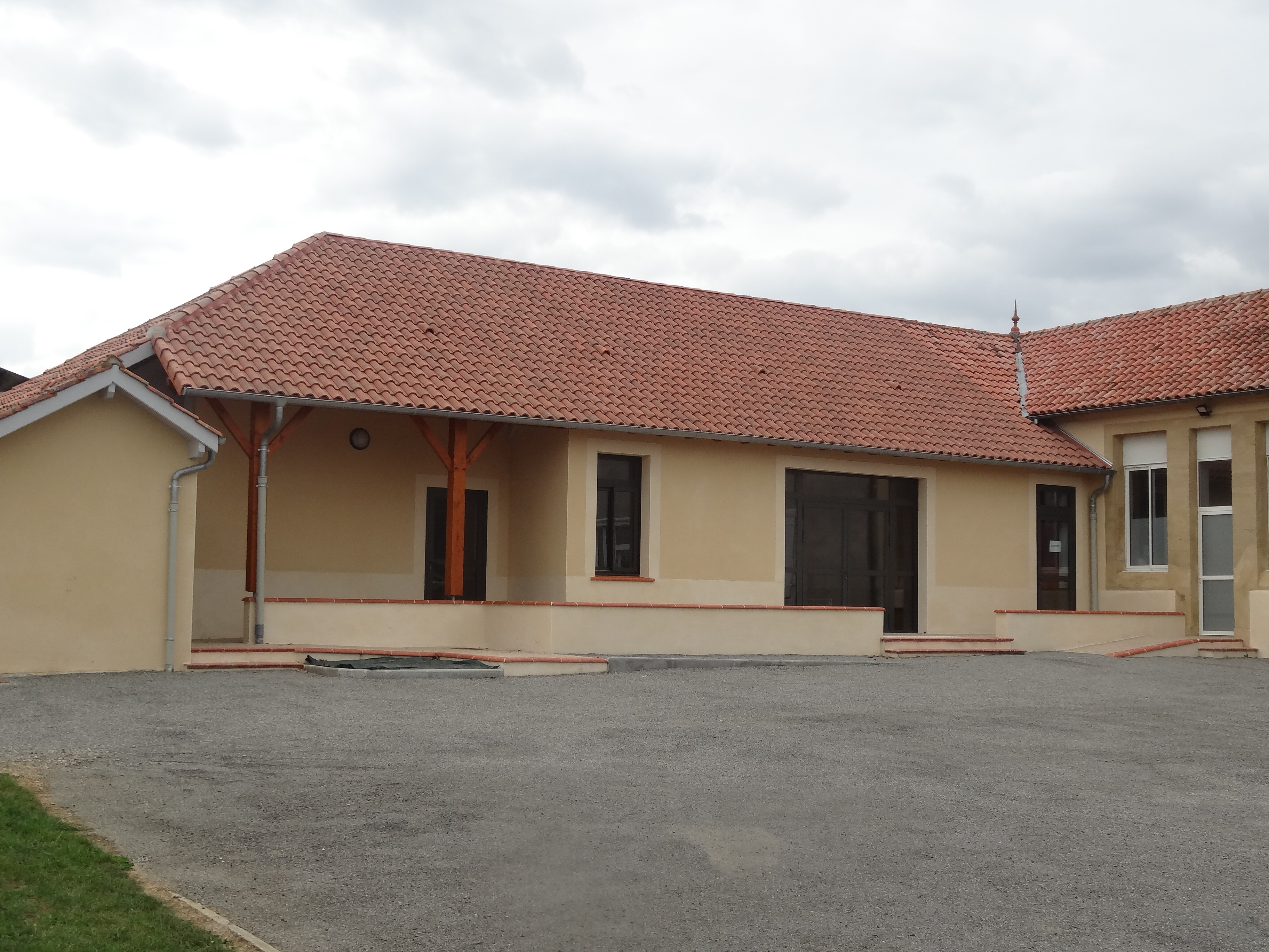 Foyer de Sadeillan.